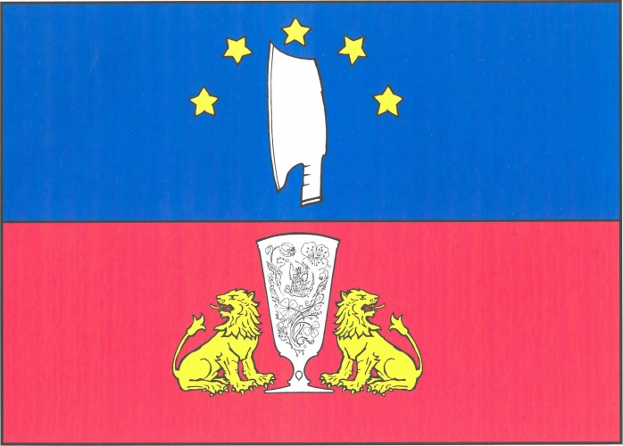 vlajka, Sklené, okres Žďár nad Sázavou